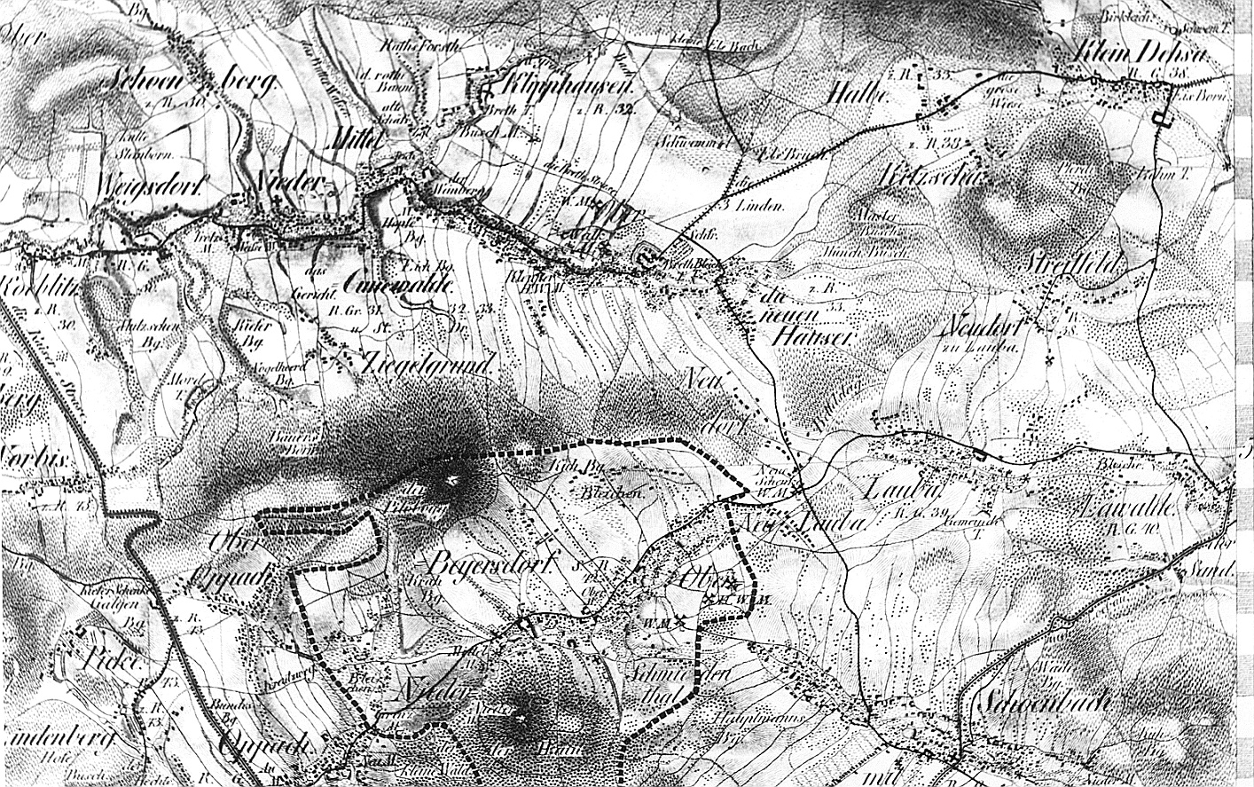 Original image description from the Deutsche Fotothek Beiersdorf. Oberreit, Sect. Stolpen, 1821/22